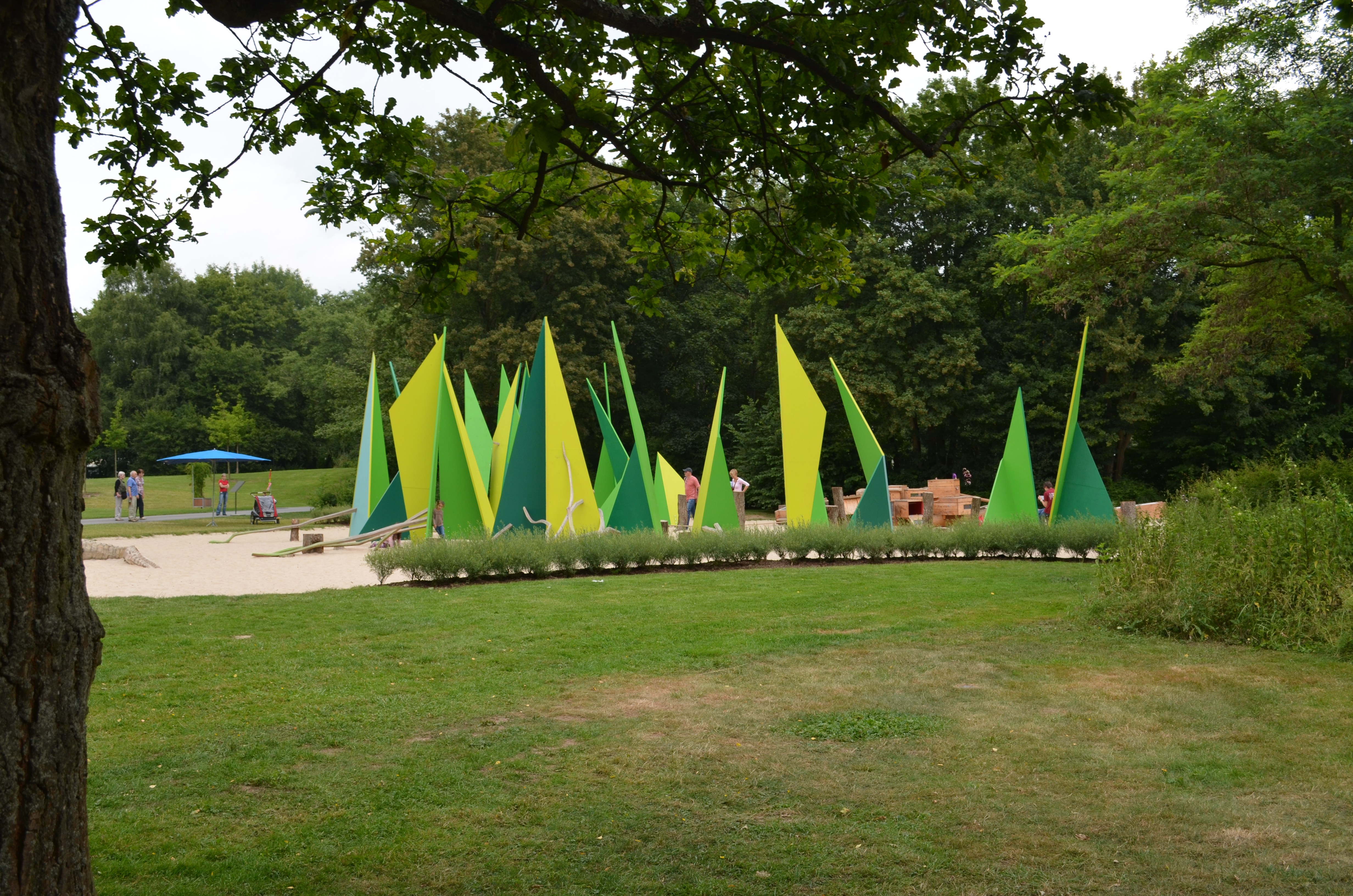 Gießen, Landesgartenschau, Wieseckaue, Spielplatz